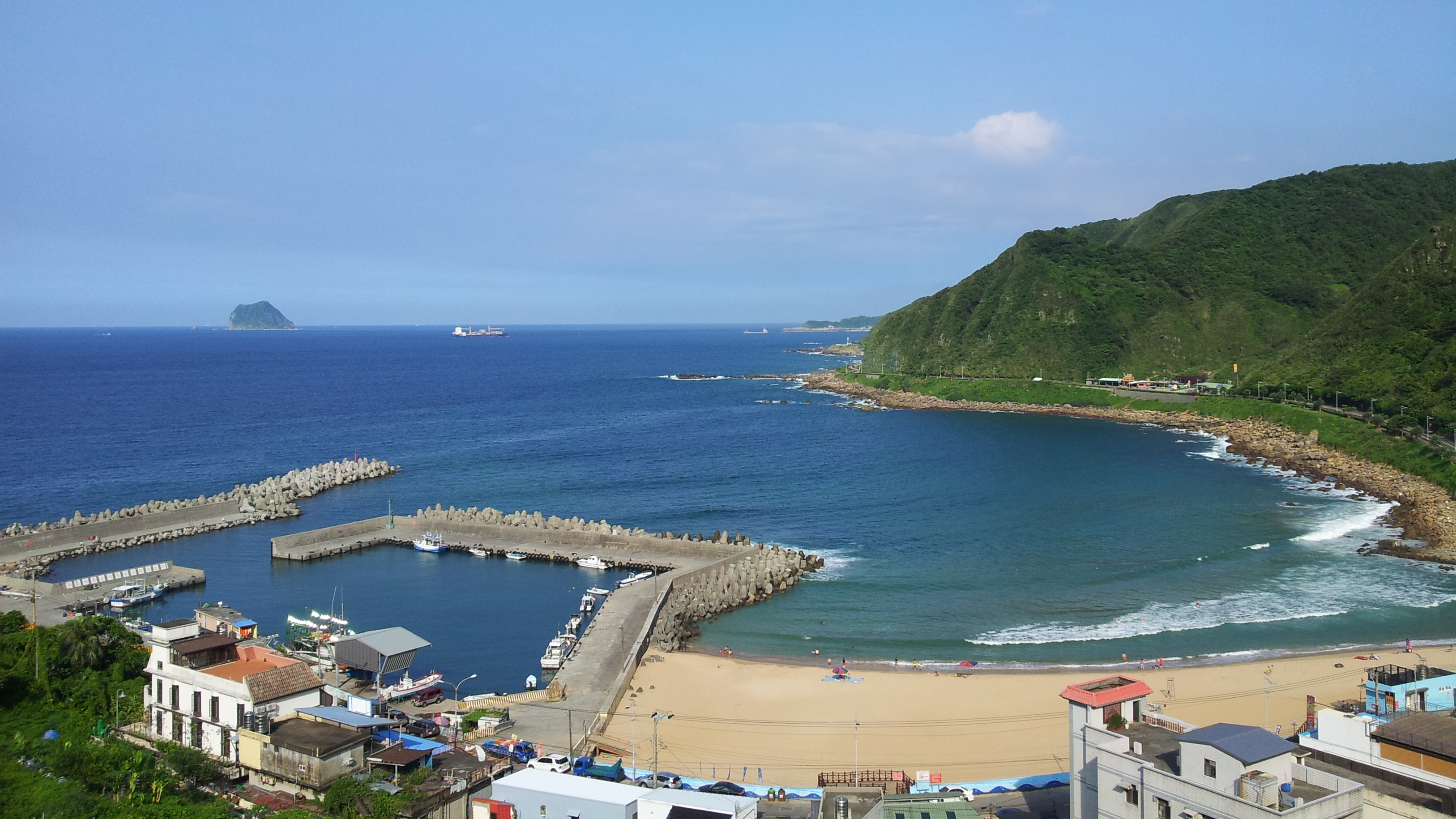 204, Taiwan, 基隆市安樂區內寮里